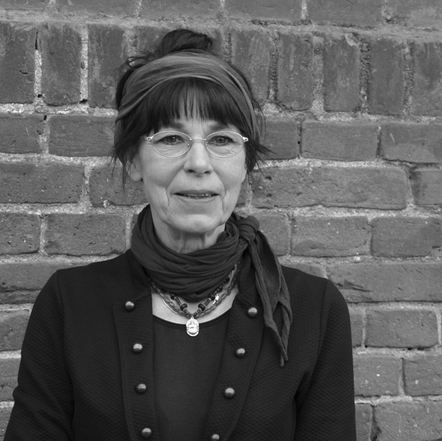 Die Bildhauerin Sonja Eschefeld währen einer Ausstellungseröffnung in Börnicke.